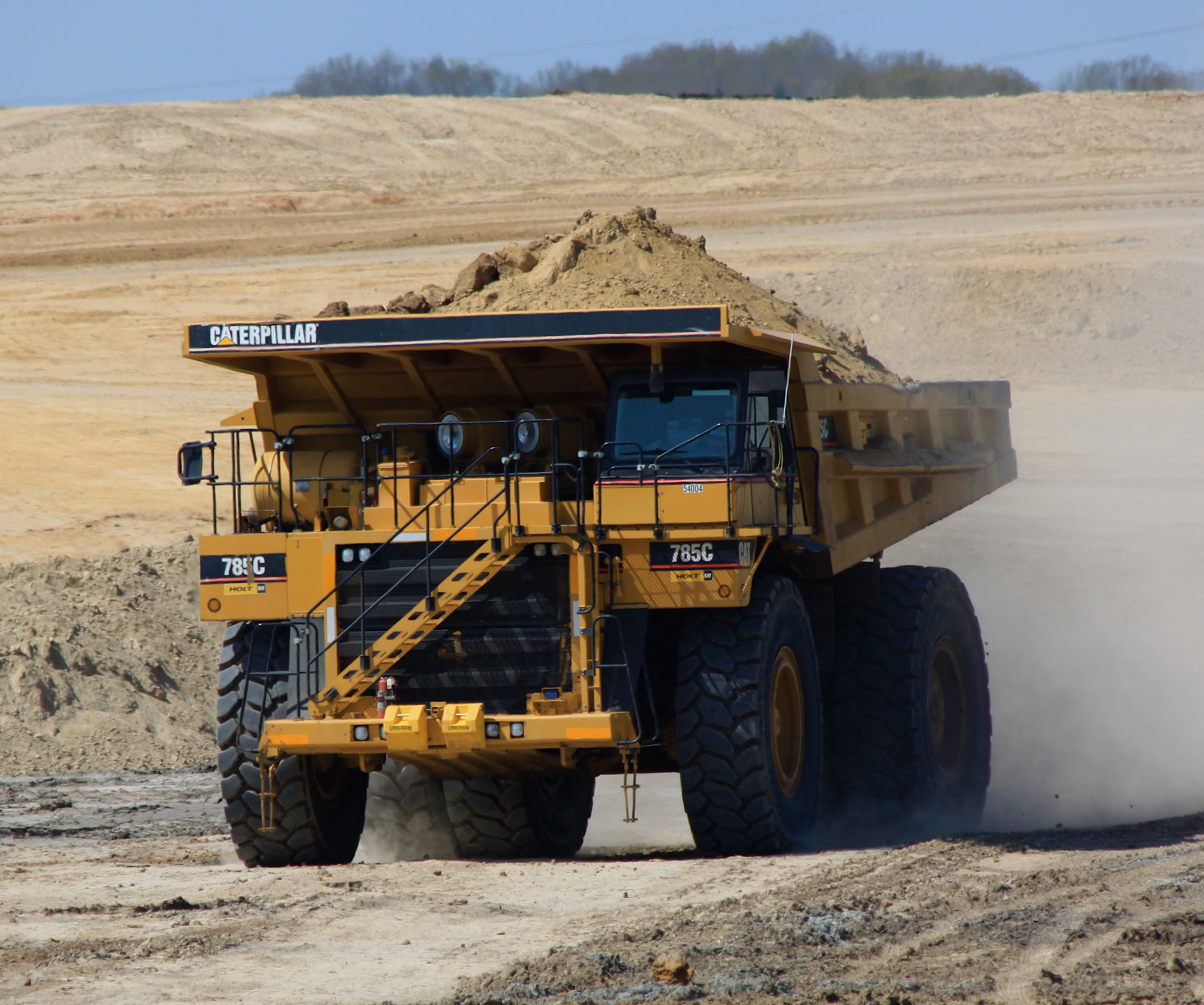 Hauling overburden. Kosse Mine supplies Oak Grove power plant.